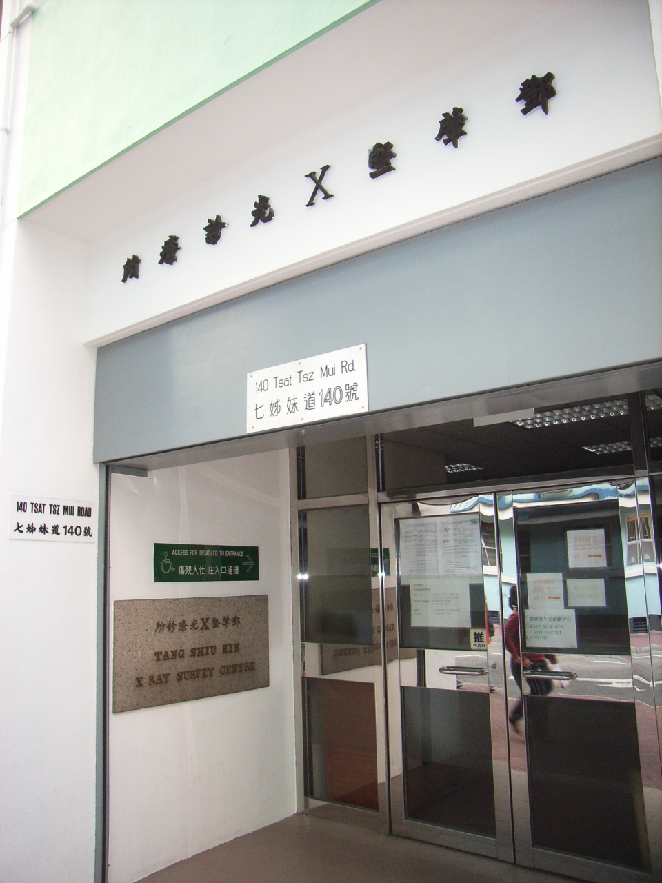 七姊妹道（Tsat Tsz Mui Road）140 號 Photographer is User:Huang Kong Hing